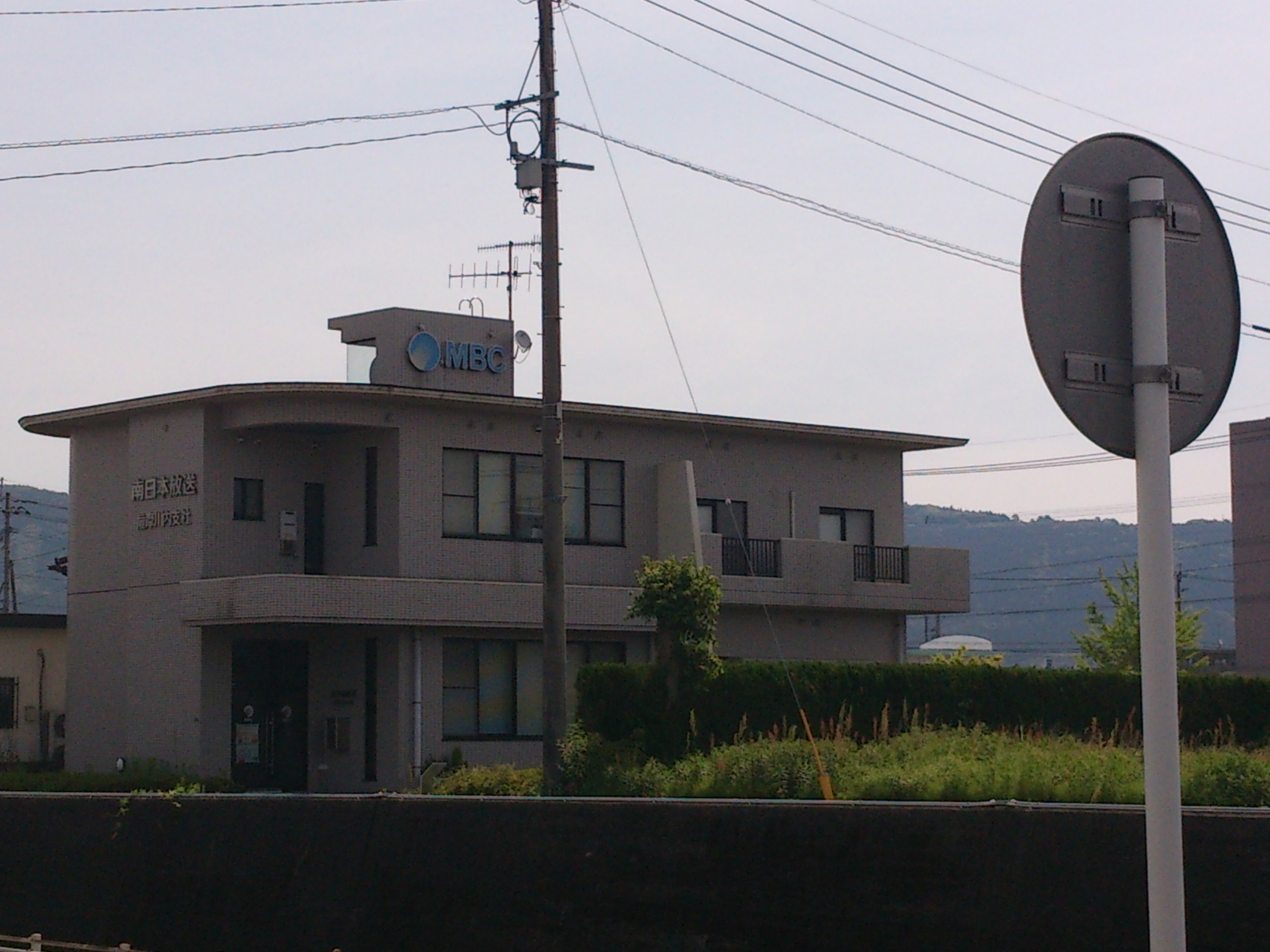 南日本放送薩摩川内支社。